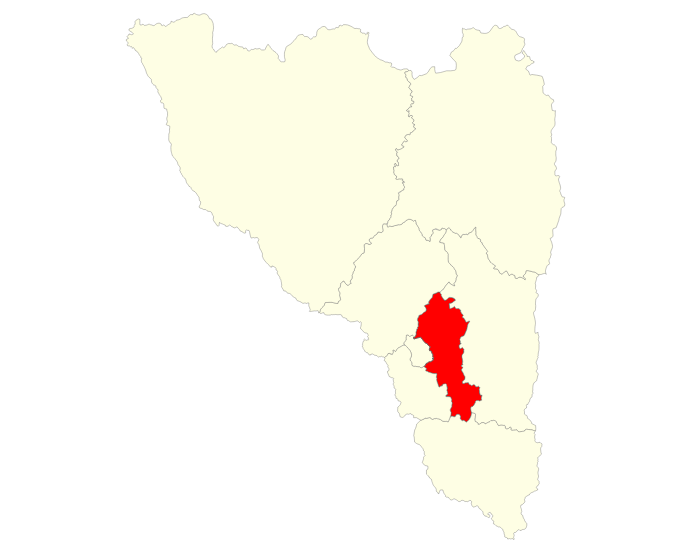 Localisation du district d'Avaradrano dans la région Analamanga